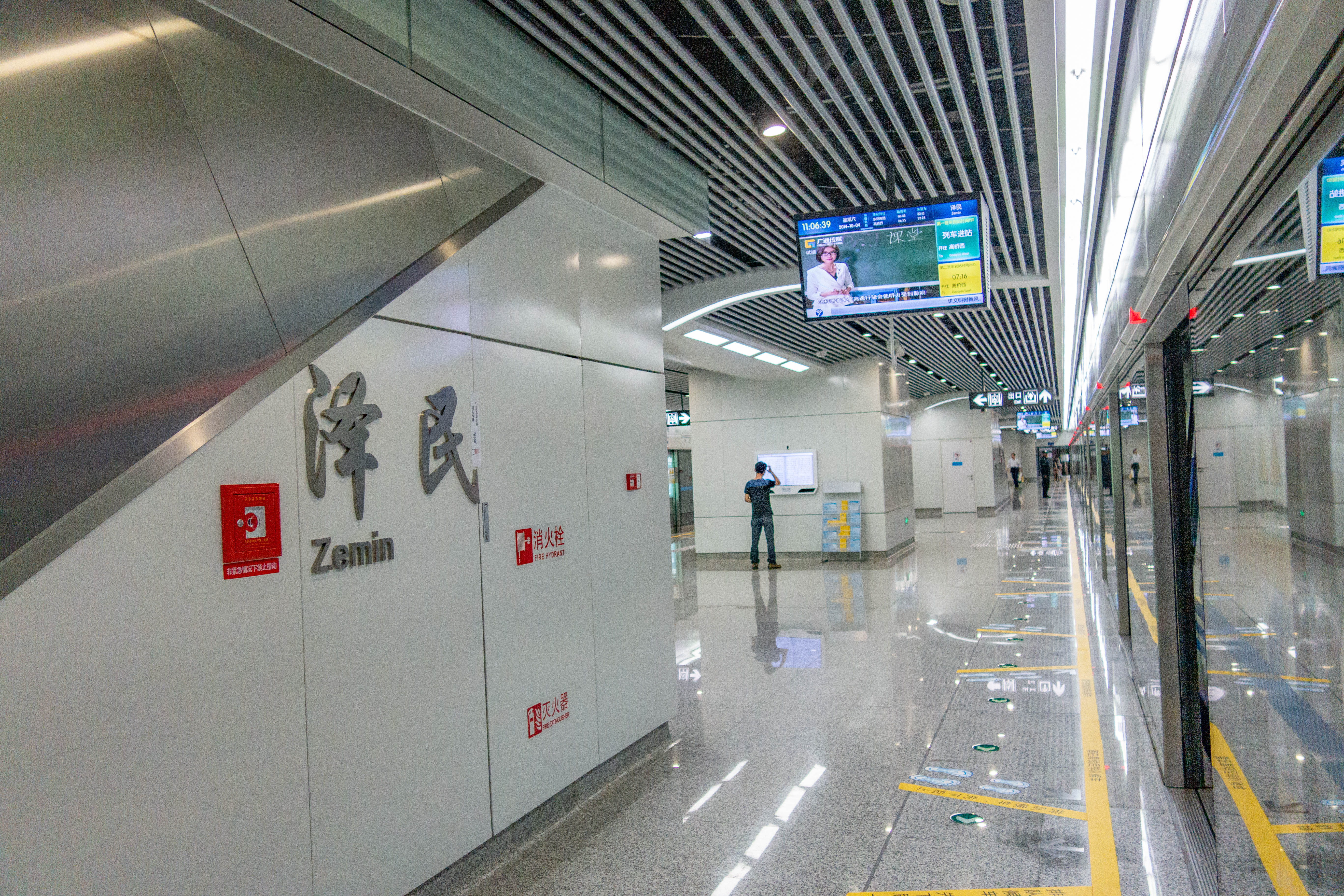 轨道交通泽民站